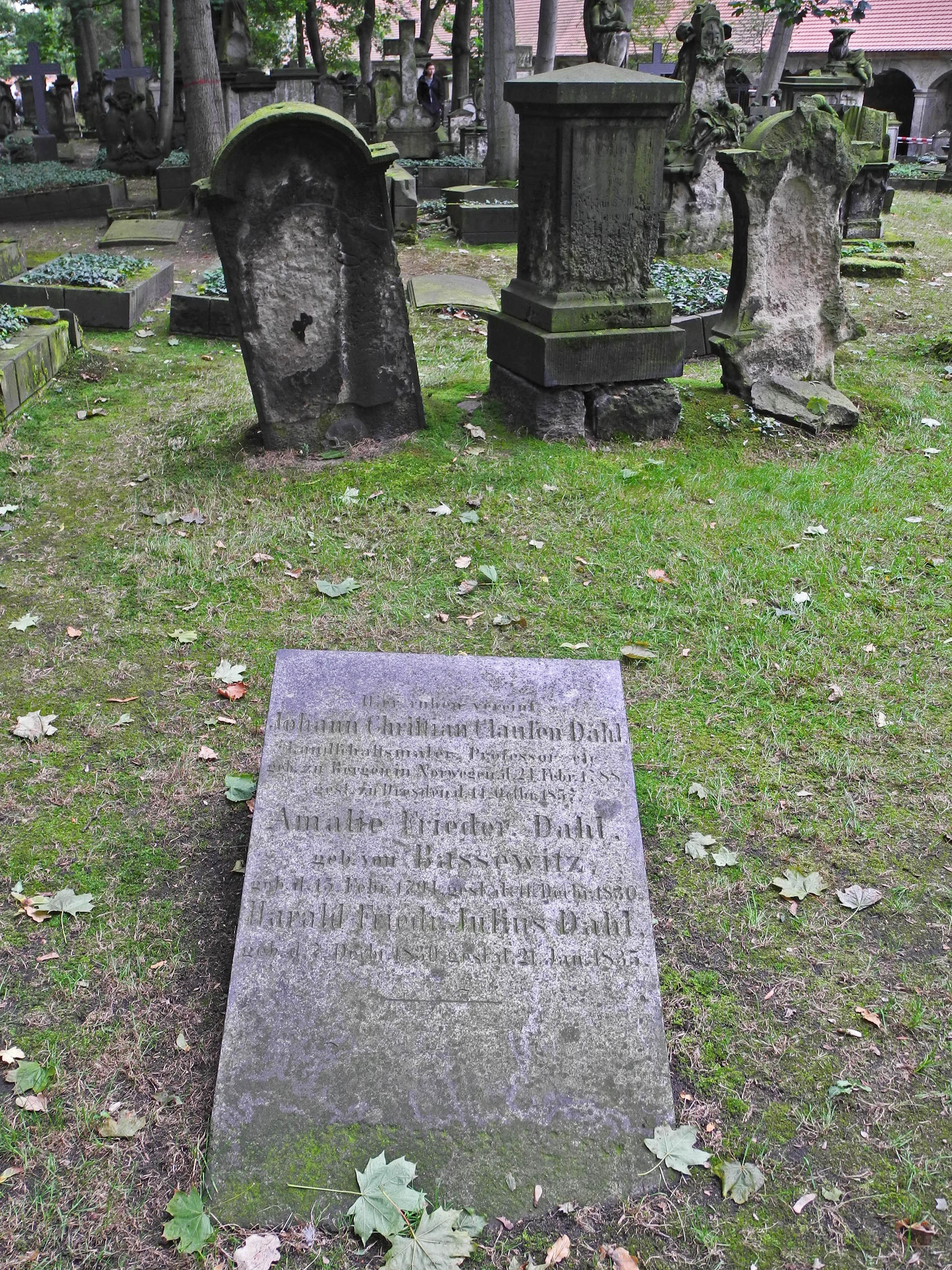 Grabstätte von Johann Christian Clausen Dahl (1788–1857) auf dem alten Eliasfriedhof in Dresden